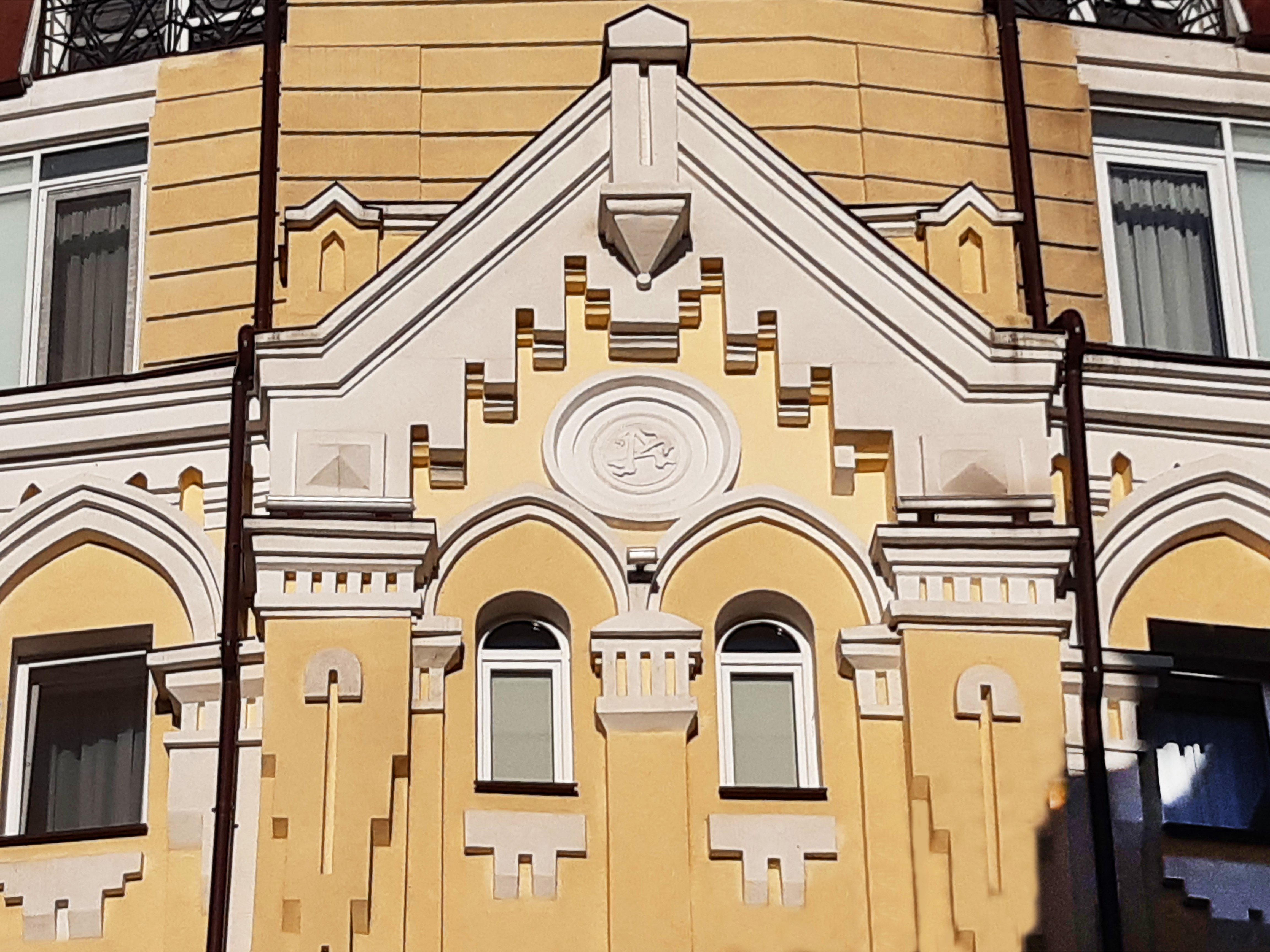 Прибутковий будинок у провулку Шевченка, Київ, провулок Тараса Шевченка, 8б